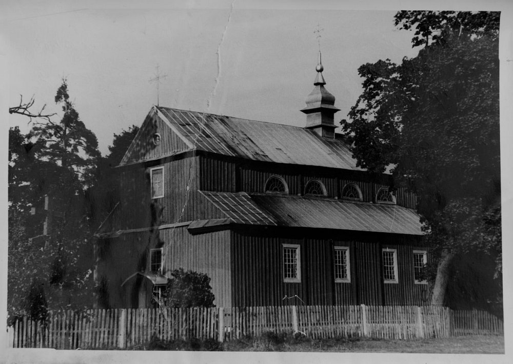 Свята-Параскева-Пятніцкая царква, Опаль